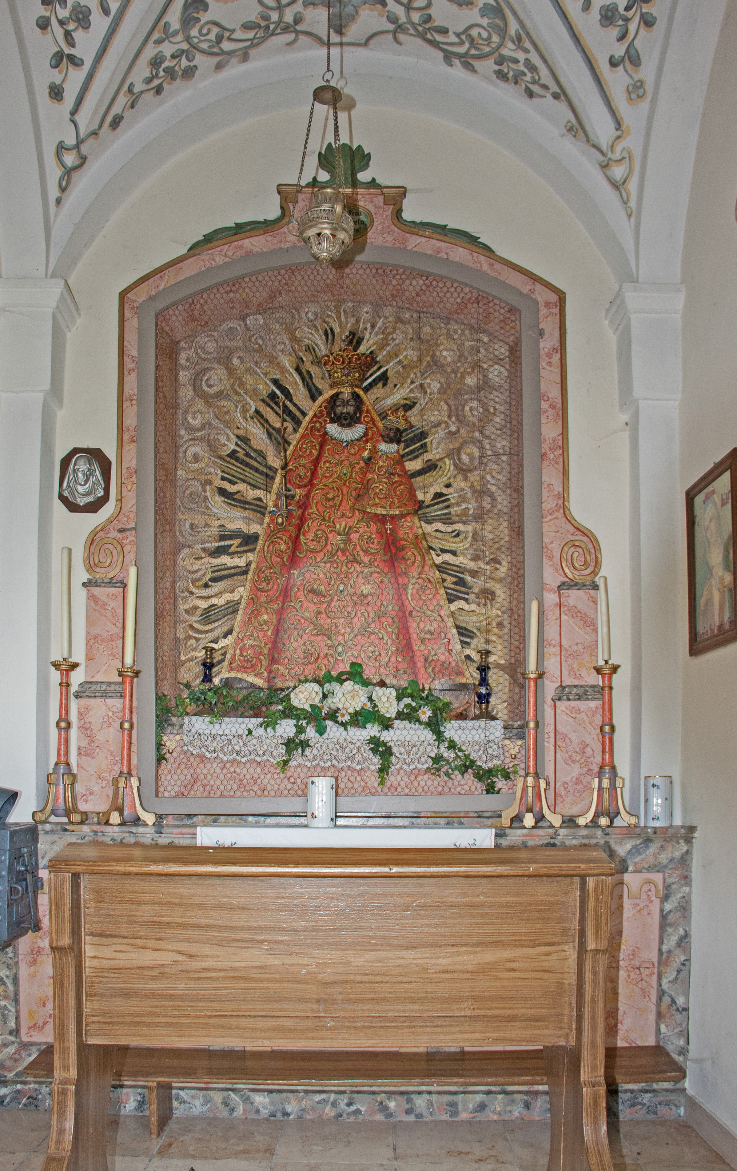 Ausstattung der Kapelle